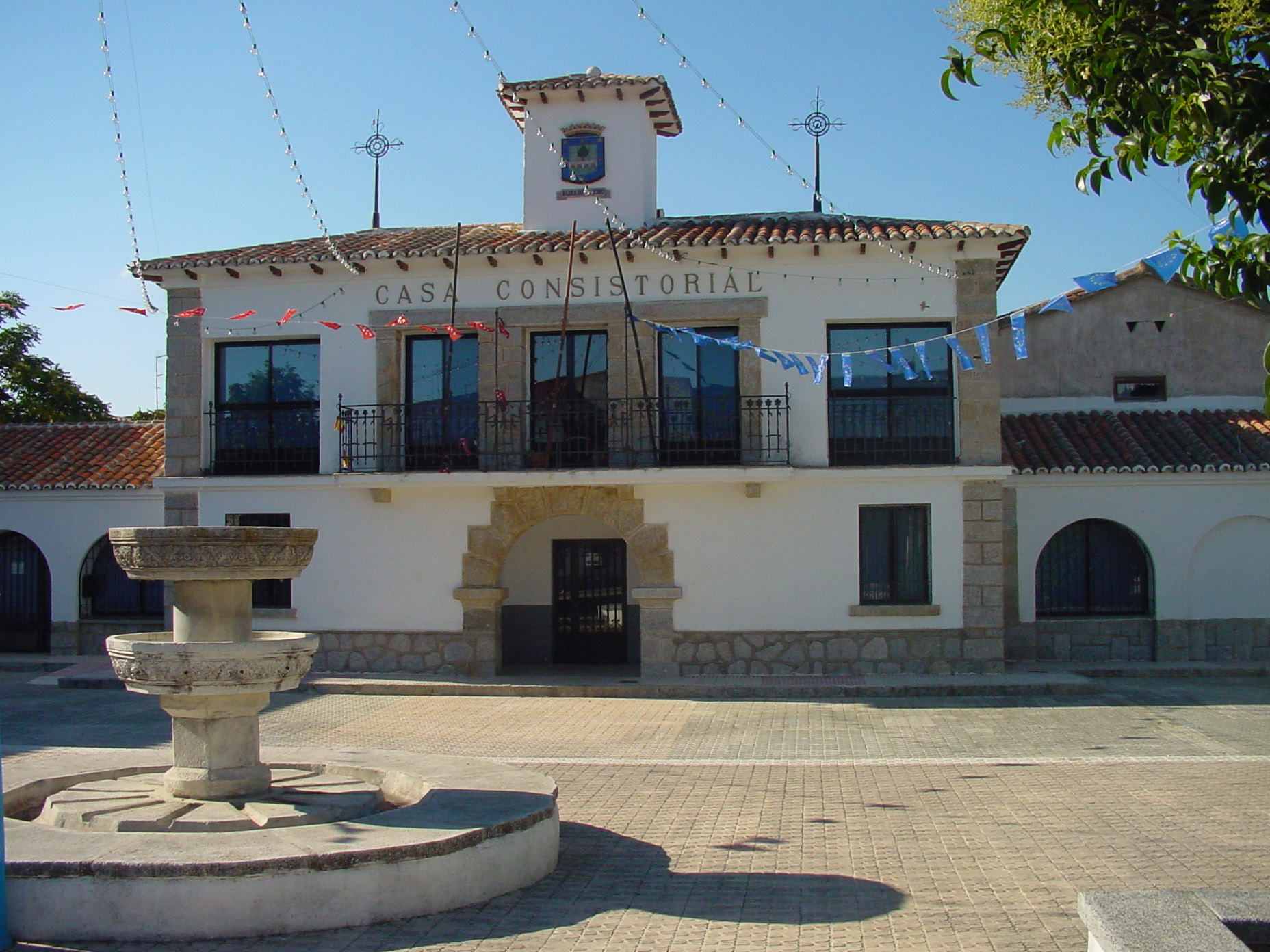 Ayuntamiento de Aldea del Fresno.